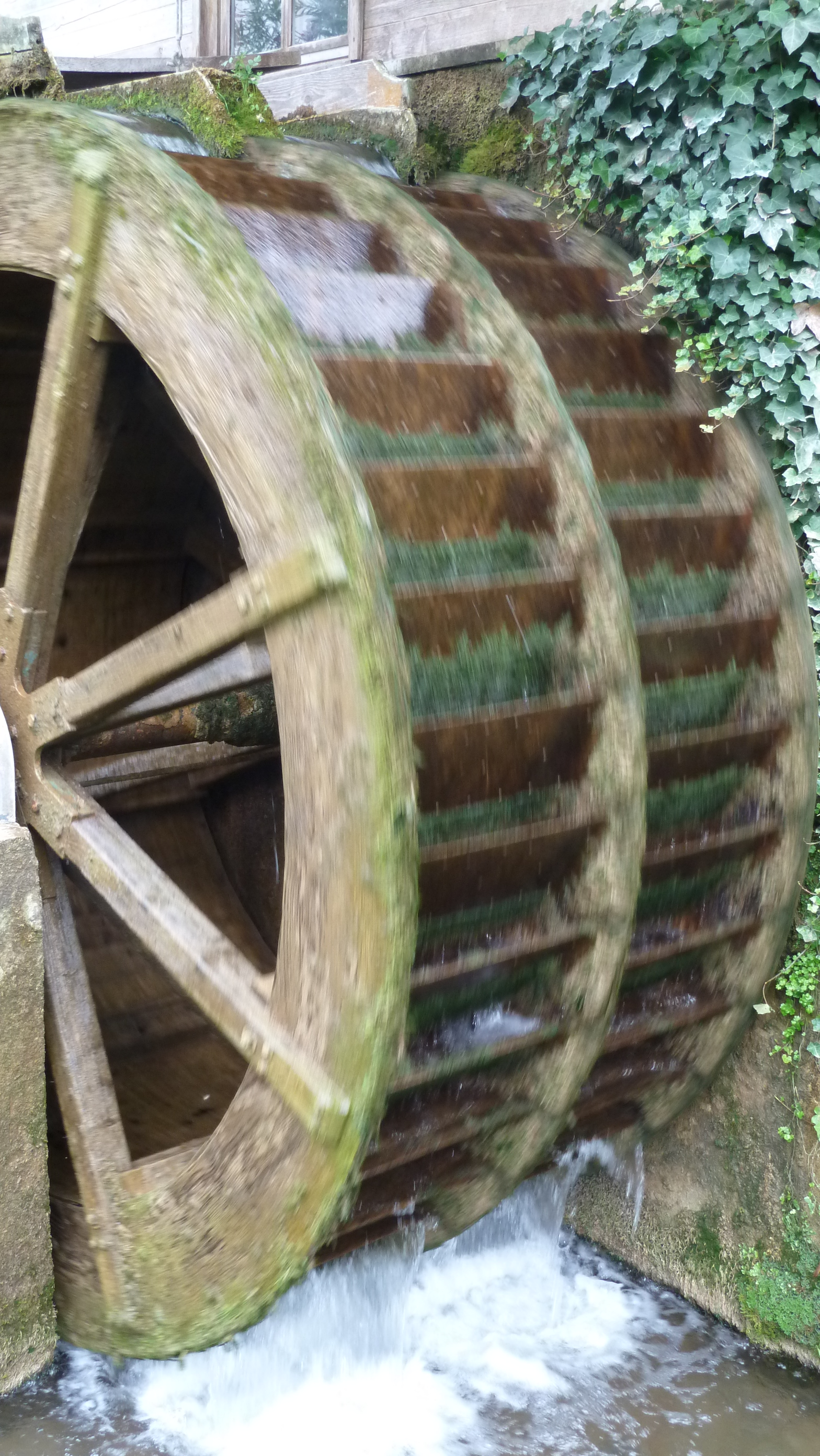 Ein hölzernes Wasserrad nutzt das durch den Inngletscher geschaffene Gefälle des Flossinger Bachs innerhalb des Ortes zur Stromerzeugung